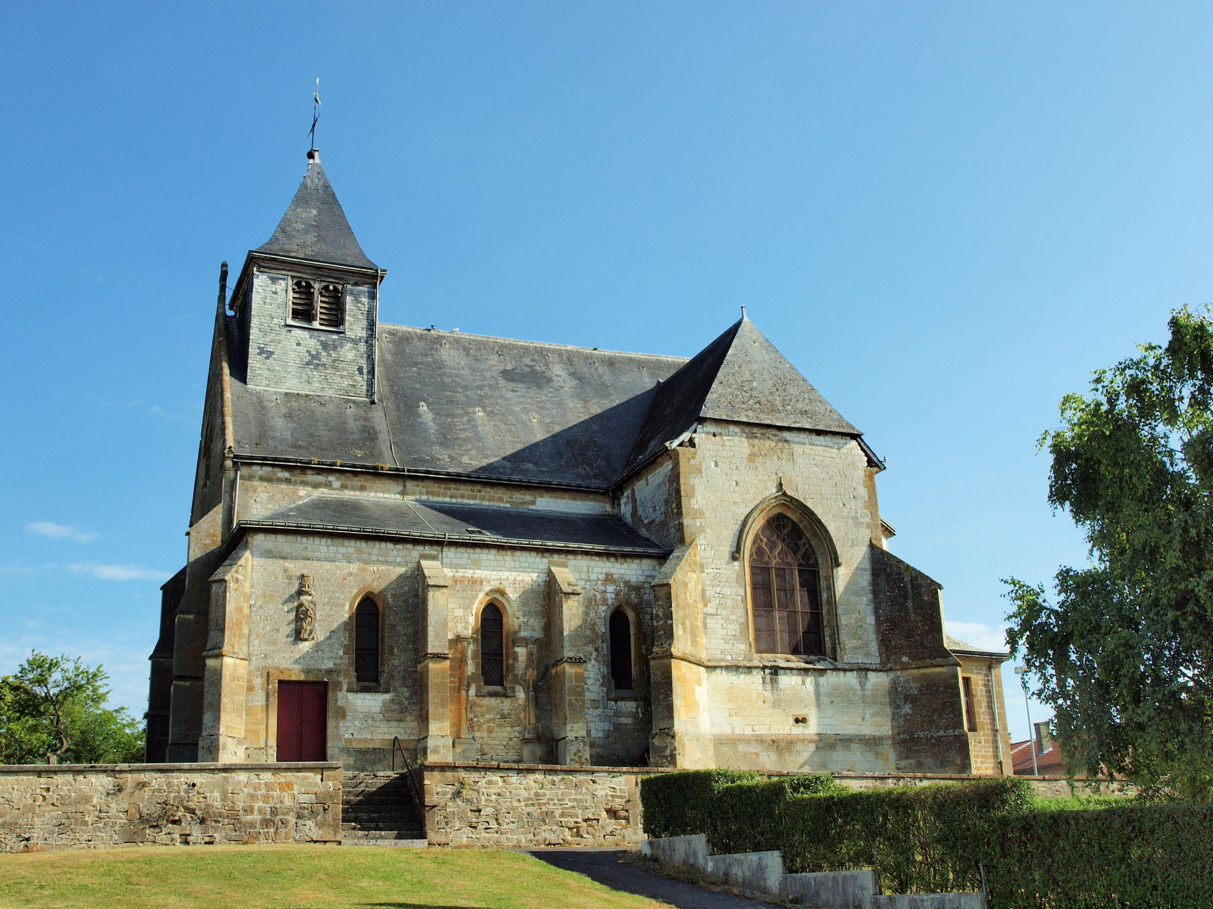 Église Saint-Maurice de Vrizy (Ardennes, France)